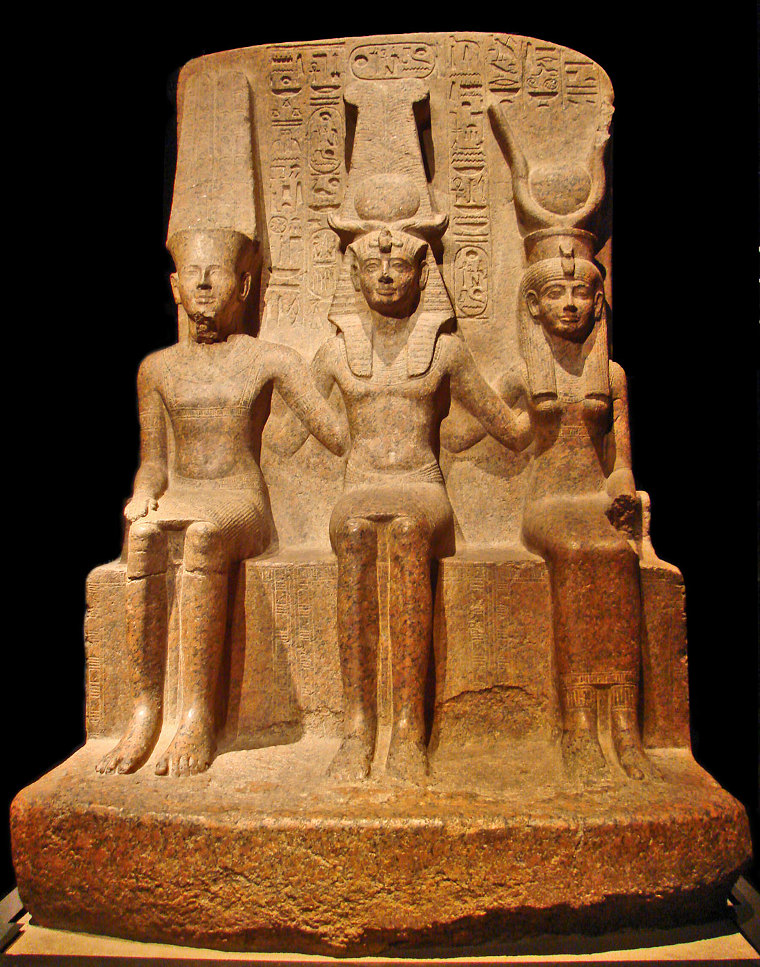 Le Roi Ramses II (1279-1213 avant J.C.) avec le Dieu Amon et le Dieu Mut, granite rouge, temple d'Amon, Thèbes